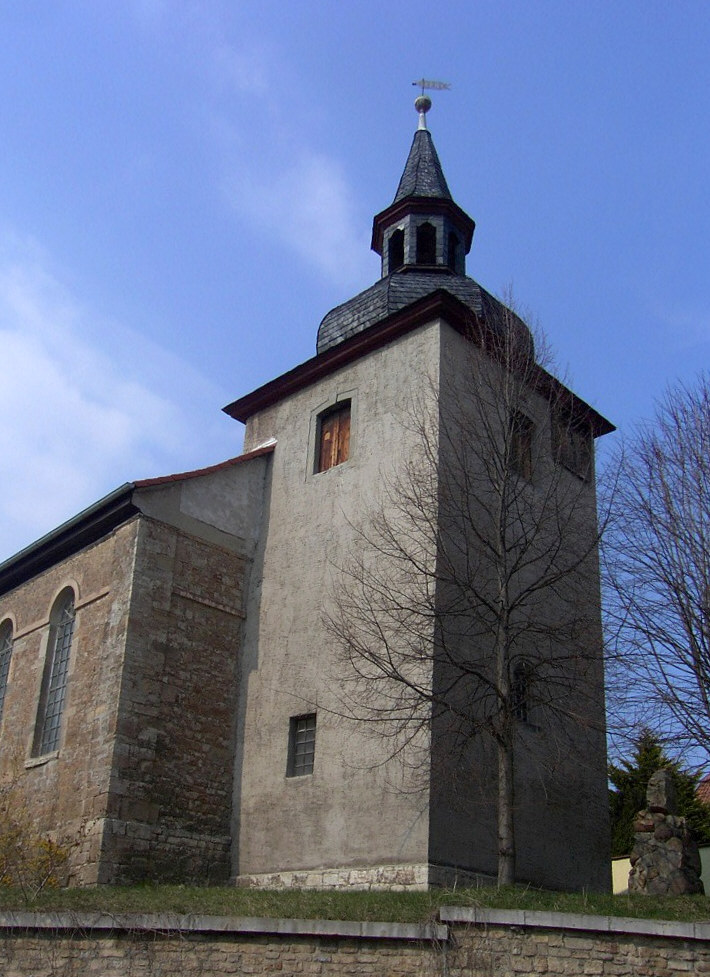 Evangelische Kirche in Nirmsdorf